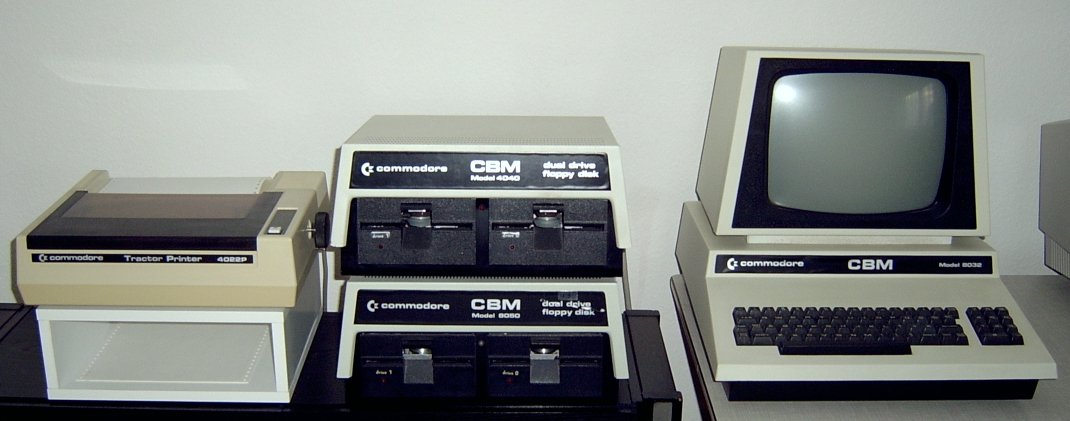 Commodore CBM-8032, Laufwerke 4040 und 8050, Drucker 4022P